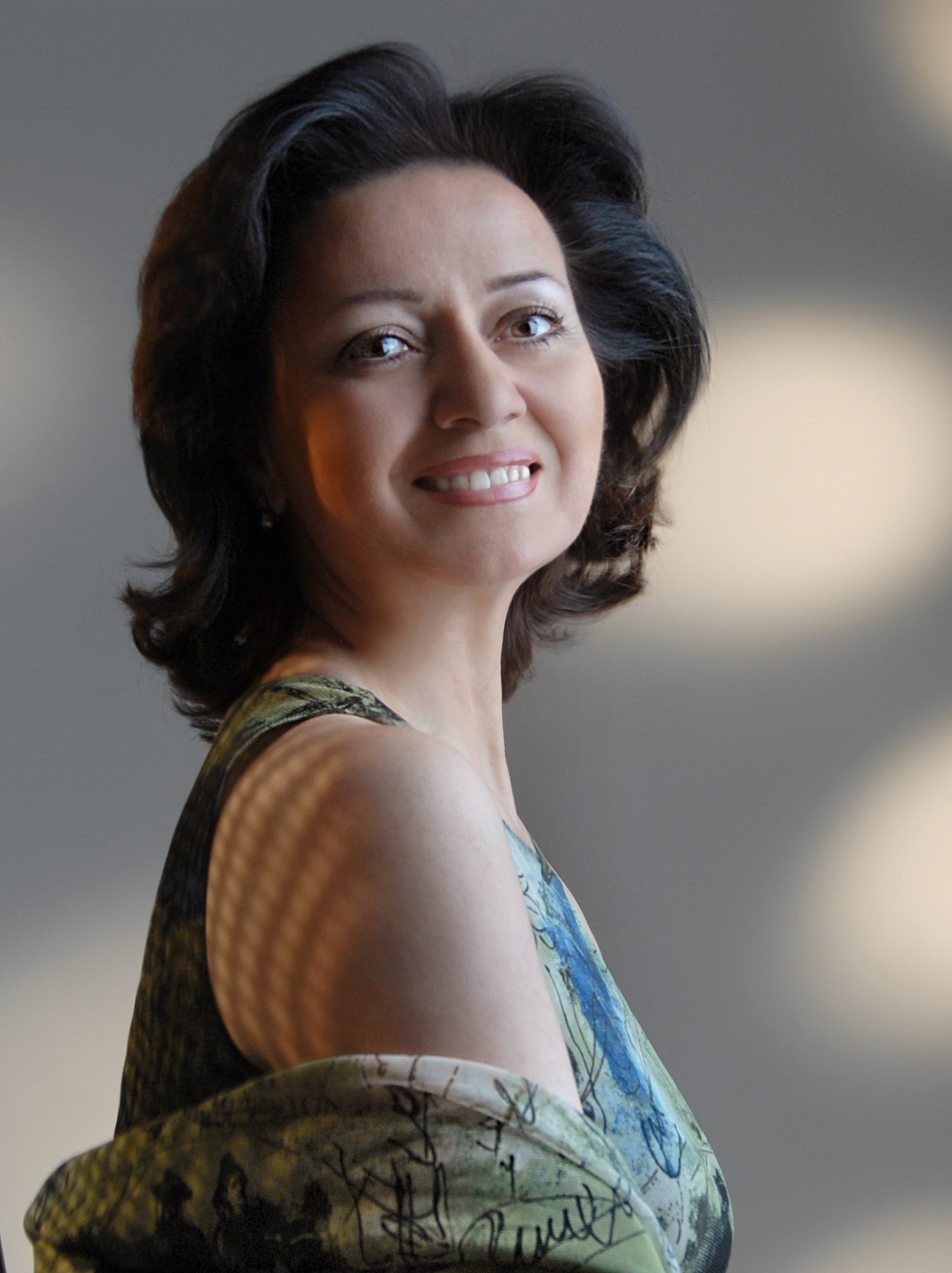 Hasmik Papian, Soprano